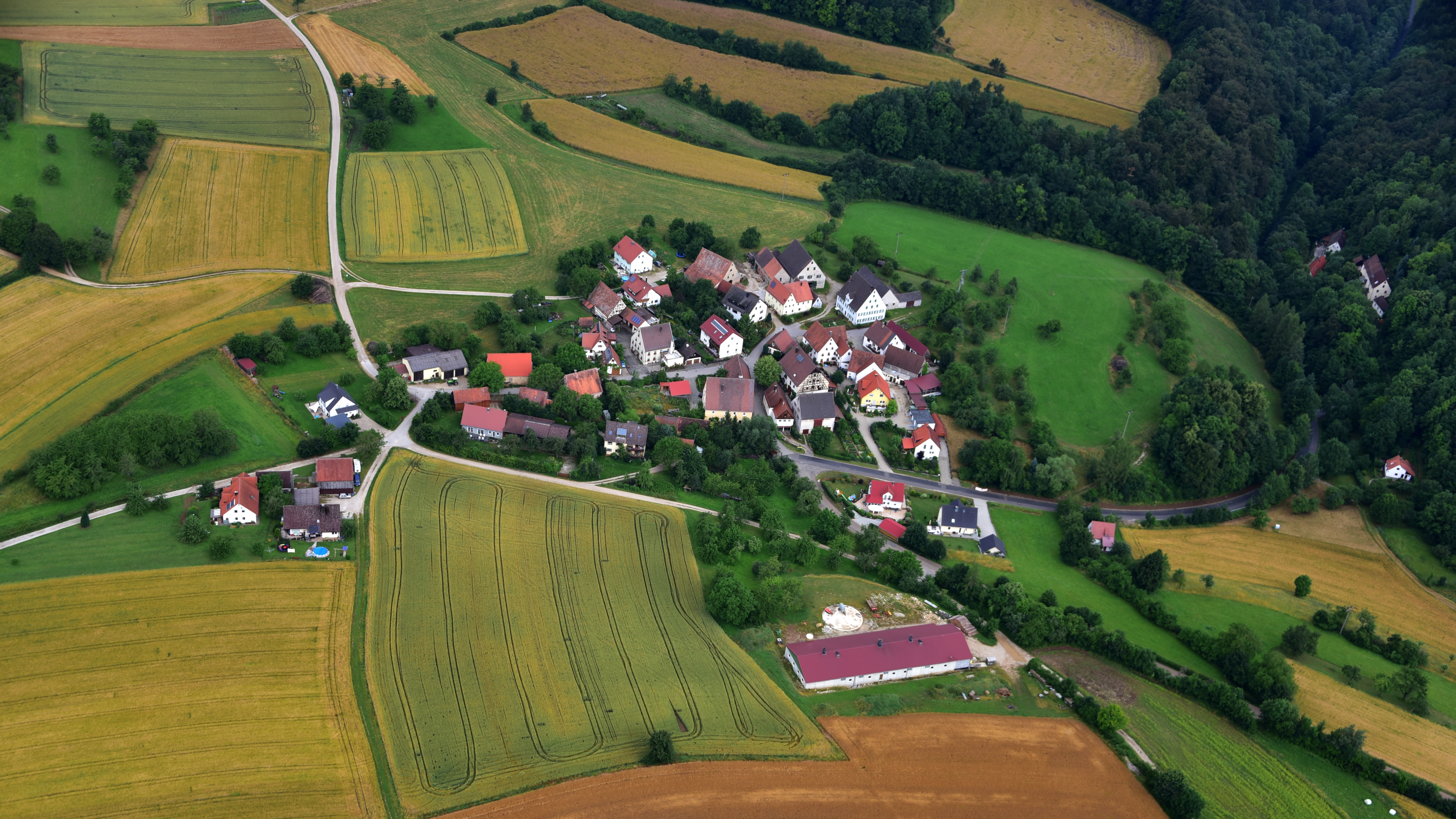 Arzlohe, Luftaufnahme (2016)